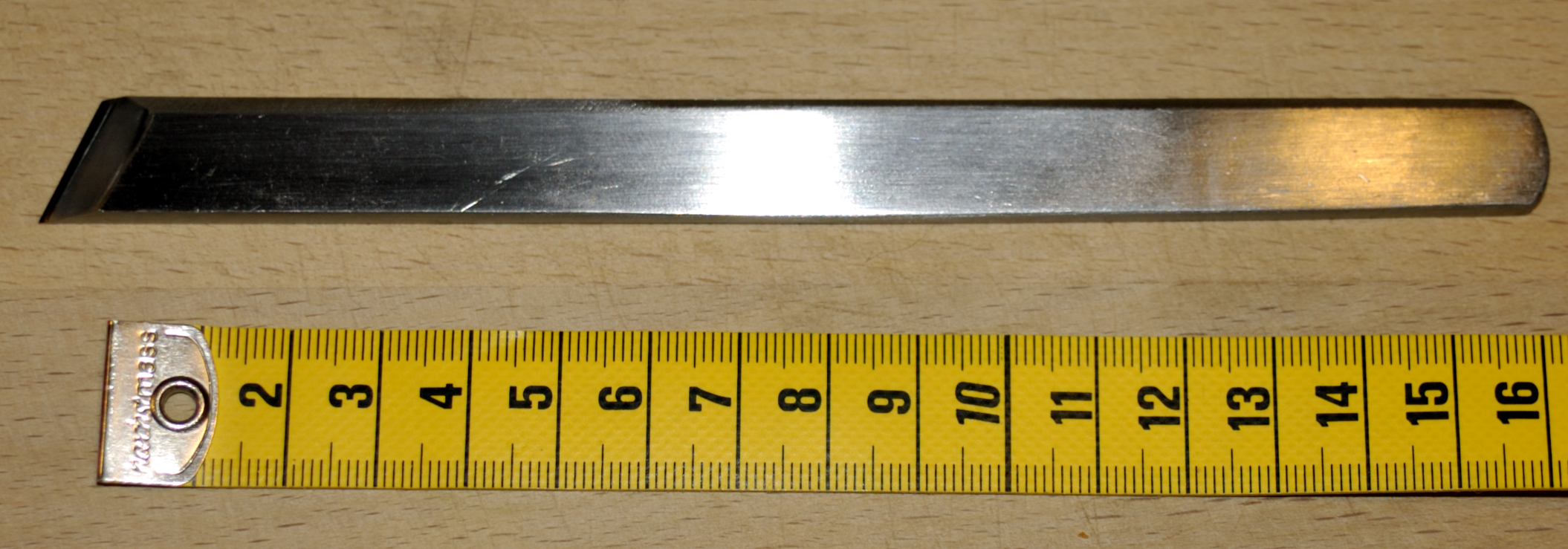 Shirabiki (Anreissmesser)